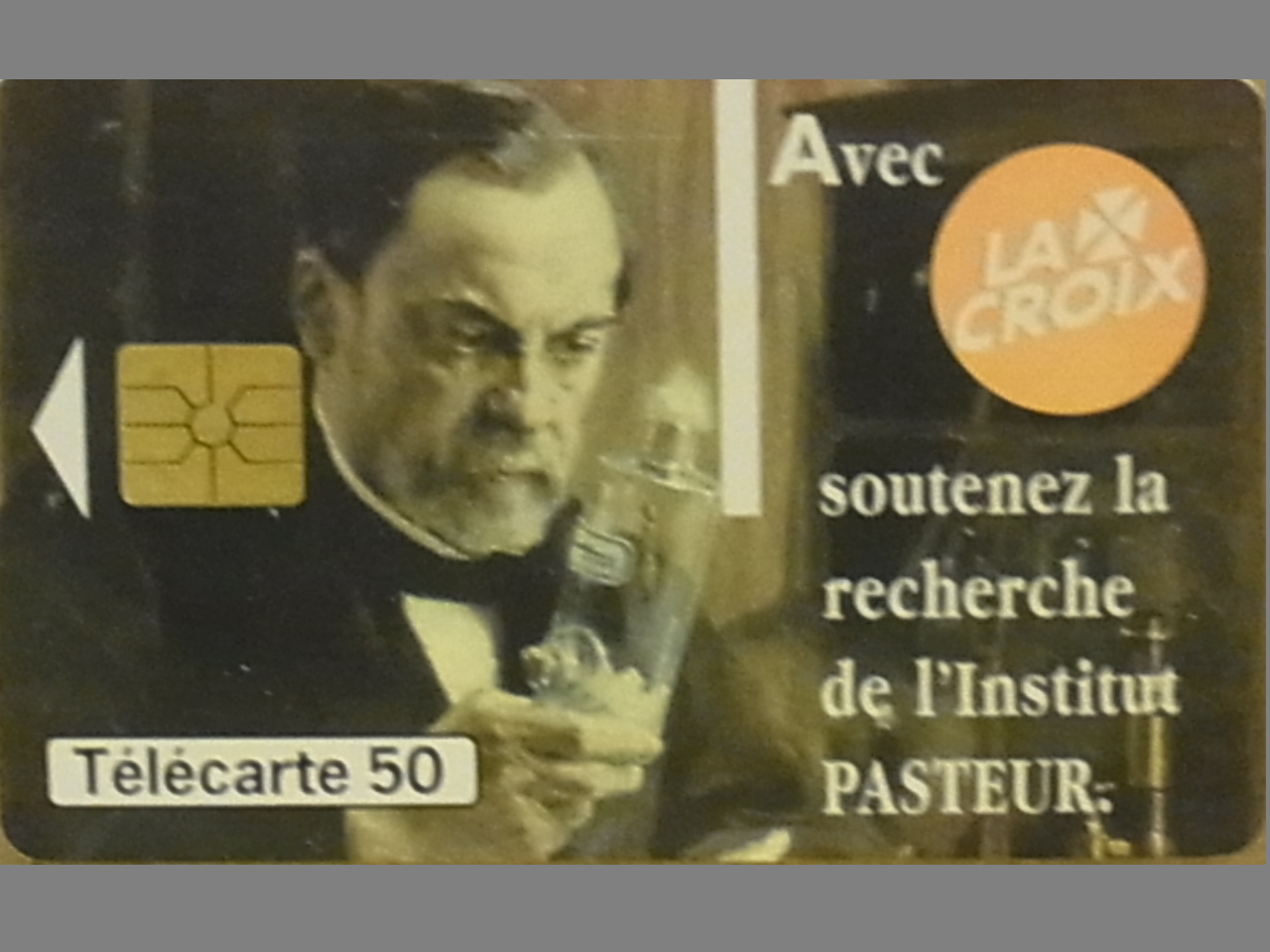 Télécarte.